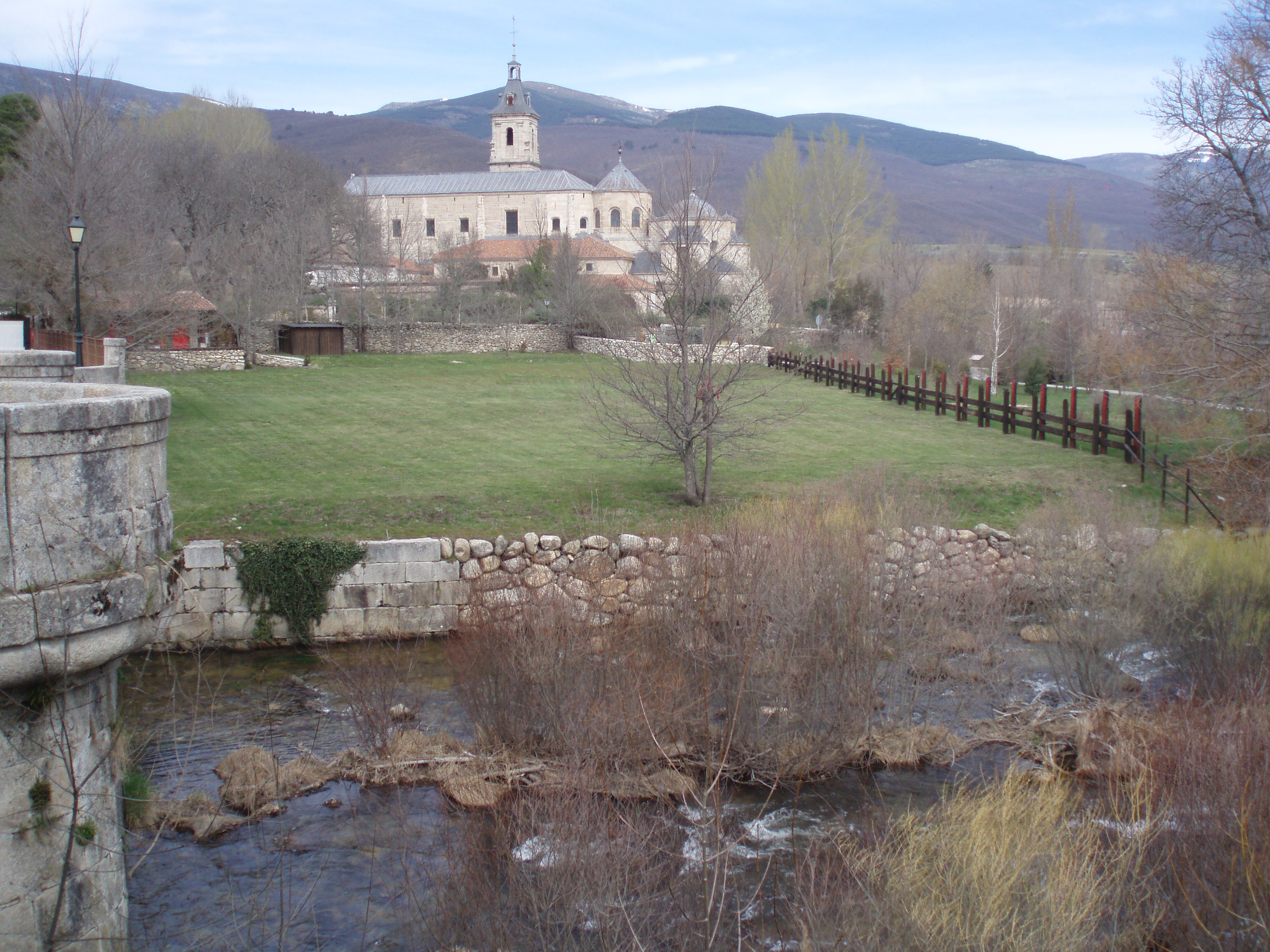 Monasterio de El Paular desde el Puente del Perdón (Sierra de Guadarrama, España).